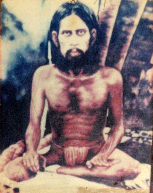 photograph of presumably Shirdi Sai Baba in his youth, as an ascetic